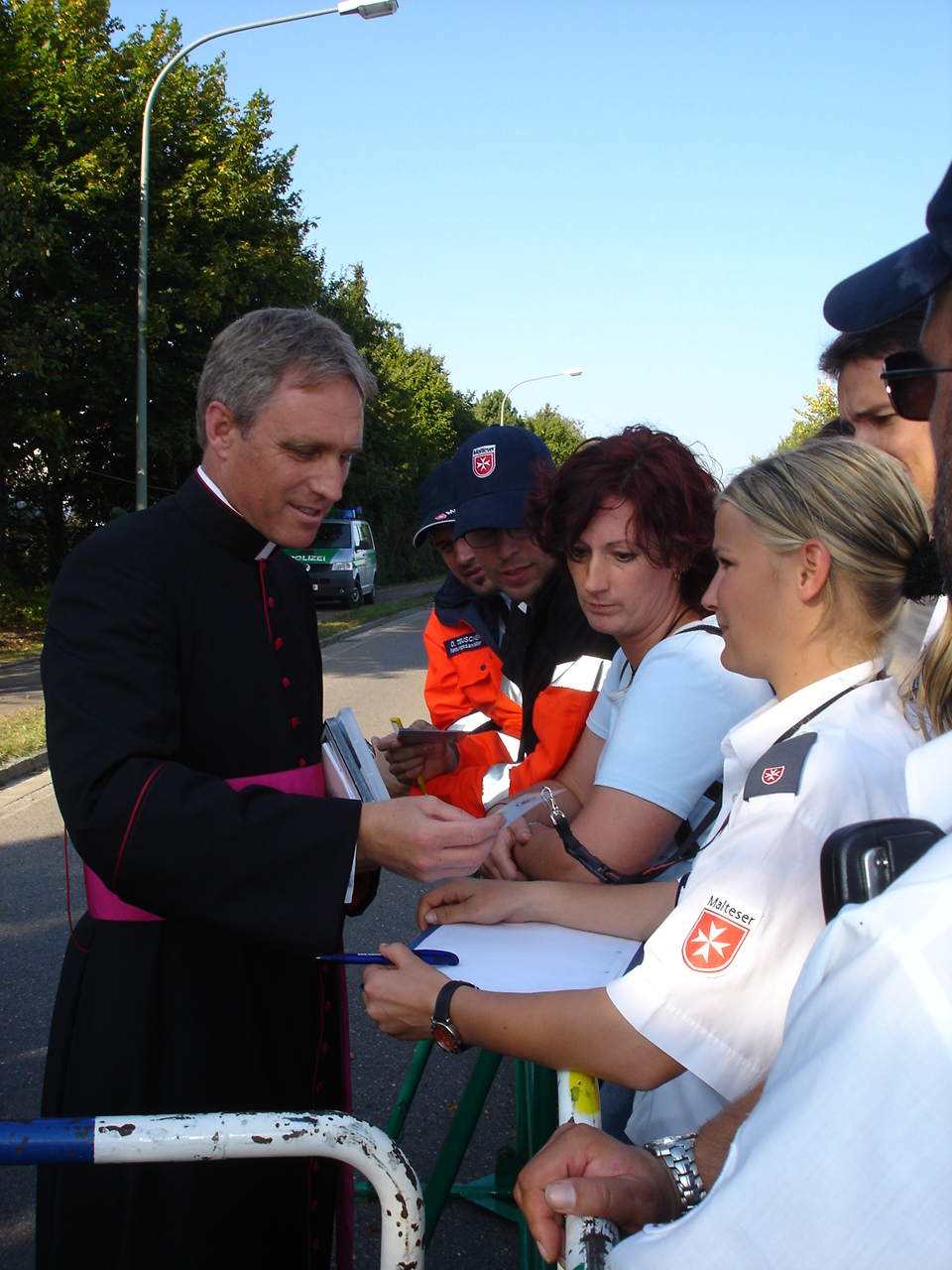 Prälat Dr. Georg Gänswein bedankt sich bei einer Helferin des Malteser Hilfsdienst e.V. Landshut für den Einsatz während der Pastoralreise des Papstes im September 2006. Das Bild entstand vor dem Privathaus des Papstes in Pentling bei Regensburg.